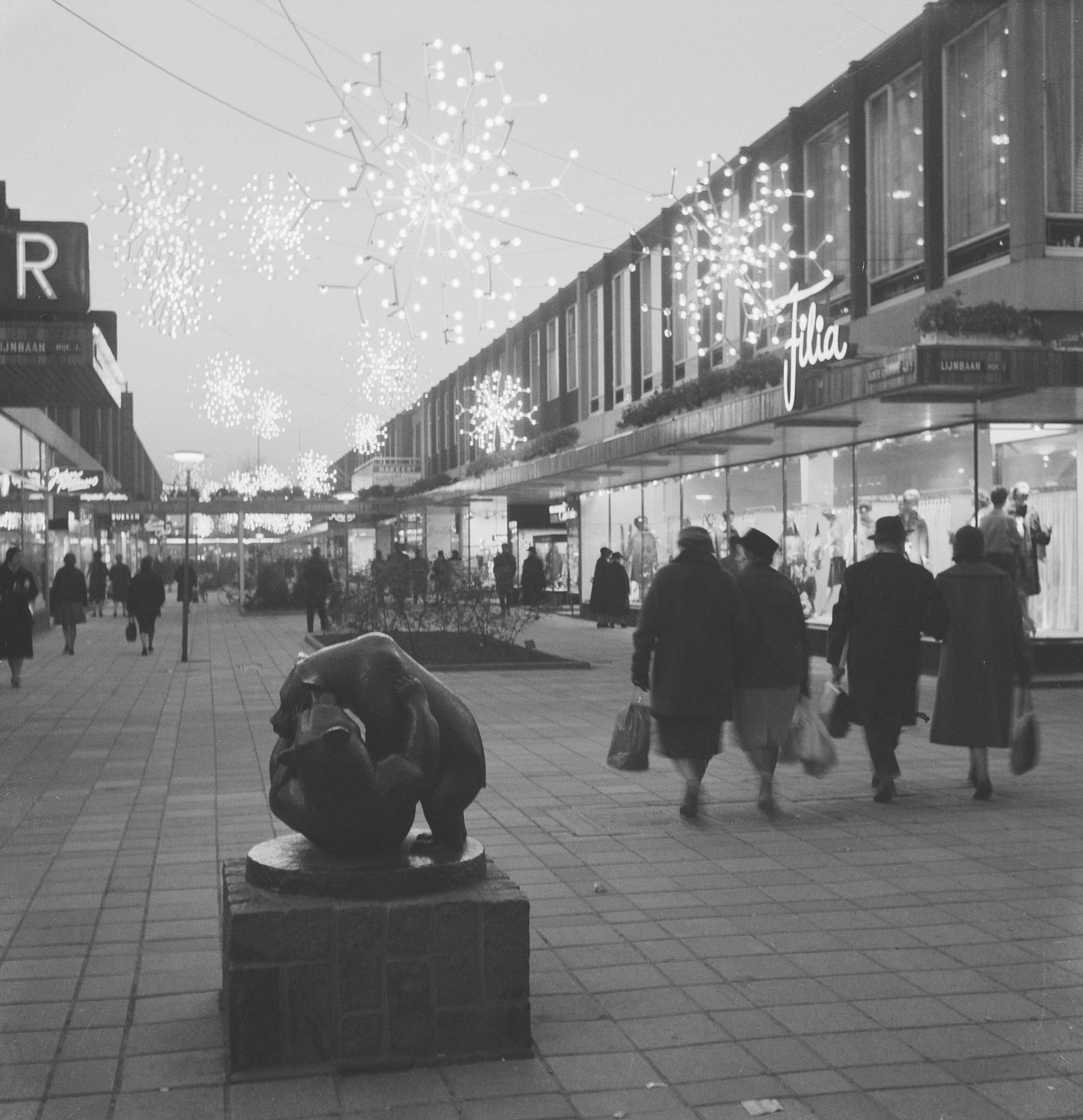 Collectie / Archief : Fotocollectie Anefo Reportage / Serie : [ onbekend ] Beschrijving : De Lijnbaan in Rotterdam verlicht met beeldje op voorgrond [Spelende beertjes (1956) door Anne Grimdalen] Datum : 21 november 1961 Locatie : Rotterdam, Zuid-Holland Trefwoorden : VERLICHTINGEN, beeldjes, voorgronden Persoonsnaam : LIJNBAAN Fotograaf : Nijs, Jac. de / Anefo Auteursrechthebbende : Nationaal Archief Materiaalsoort : Negatief (zwart/wit) Nummer archiefinventaris : bekijk toegang 2.24.01.03 Bestanddeelnummer : 913-2107